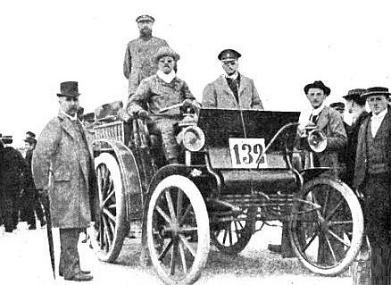 Émile Delahaye (à gauche), et Daniel Courtois sur Delahaye à Paris-Dieppe 1897 - Histoire de l'automobile, Pierre Souvestre, éd. H. Dunod et E. Pinat, 1907 (ASIN B001BPBE58) p.334